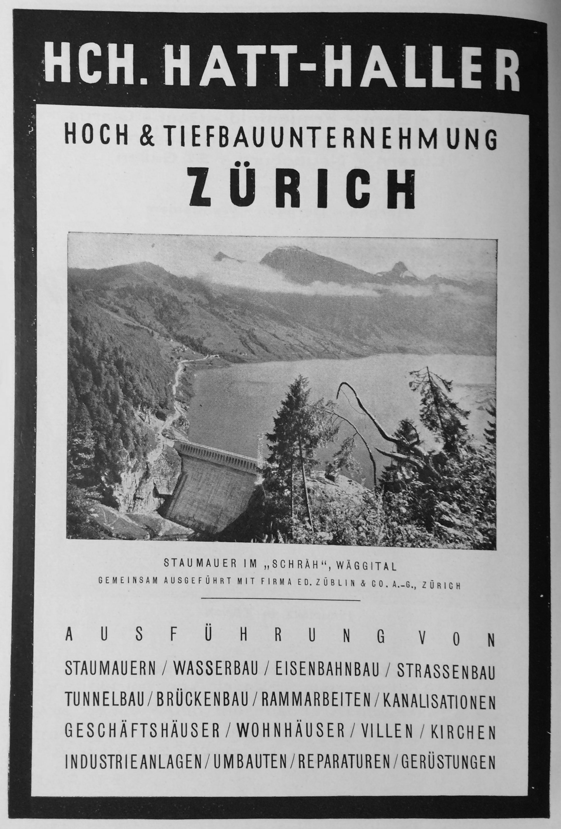 Werbung des Bauunternehmens Hatt-Haller aus Zürich mit Bilde der Staumauer des Wäggitalersees